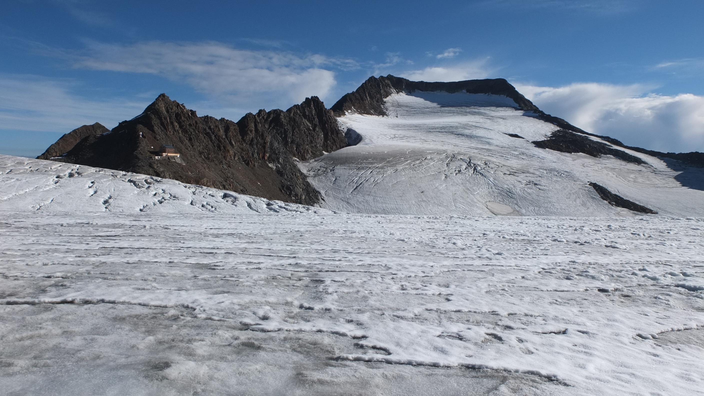 Übeltalferner mit Blick auf Müllerhütte und Wilder Freiger